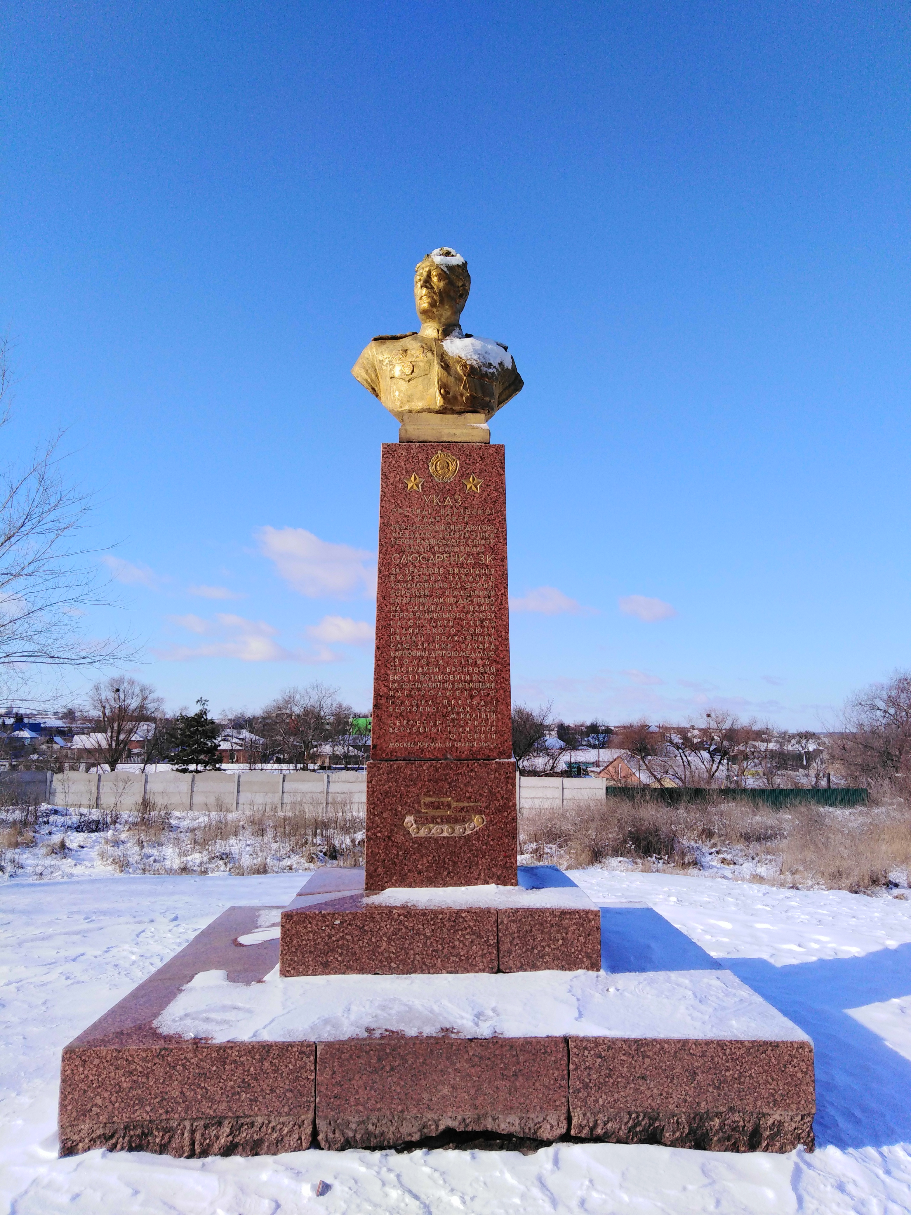 Україна. Харківська область. Зміїв. Пам’ятник герою Радянського Союзу Слюсаренку.